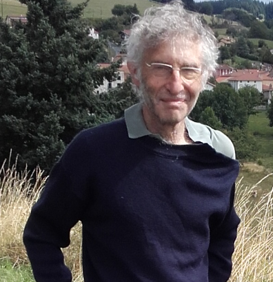 Jean-Pierre Wintenberger, juillet 2017